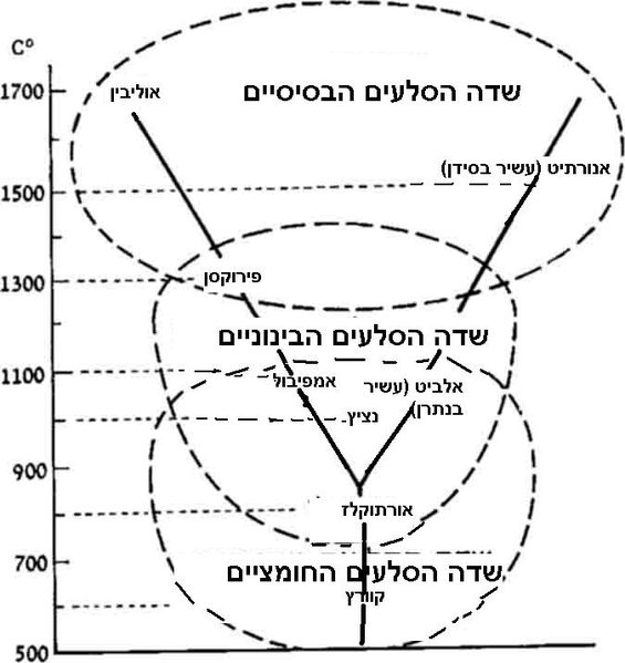 שורת בואן (שרטוט תוך שימוש בצייר של windows)